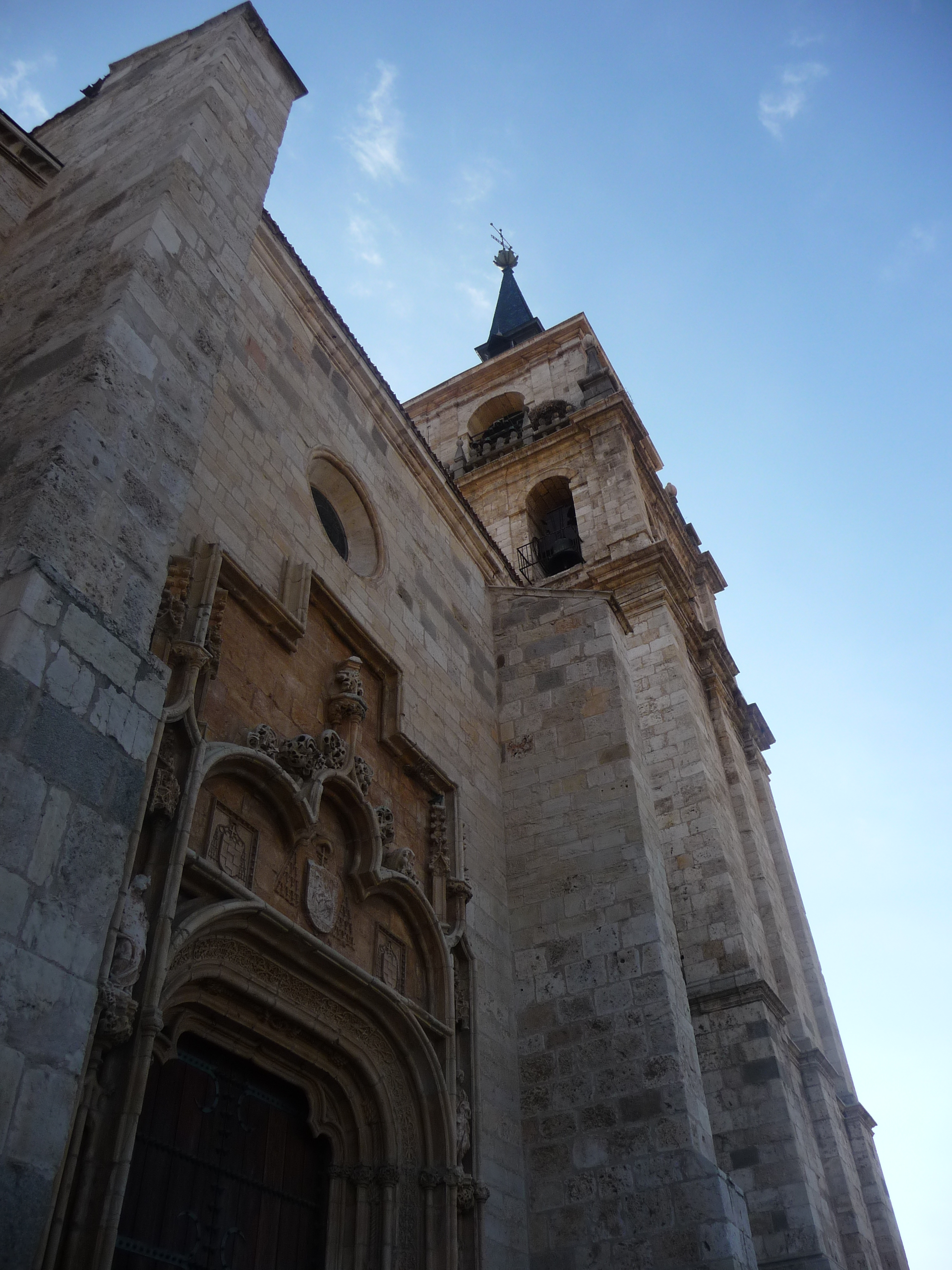 La Santa e Insigne Catedral-Magistral de los Santos Justo y Pastor es la sede episcopal de la diócesis de Alcalá de Henares, y se encuendra en la ciudad del mismo nombre, en la Comunidad de Madrid, (España). Data de 1514 y presenta un marcado estilo gótico isabelino.